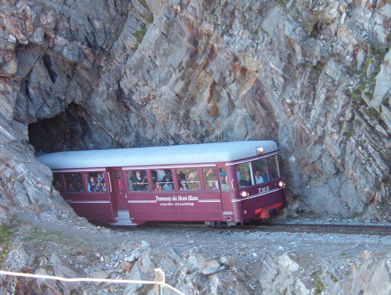 foto del treno a cremagliera W:fr:Tramway du Mont-Blanc in arrivo alla stazione W:fr:Nid d'Aigle (TMB)